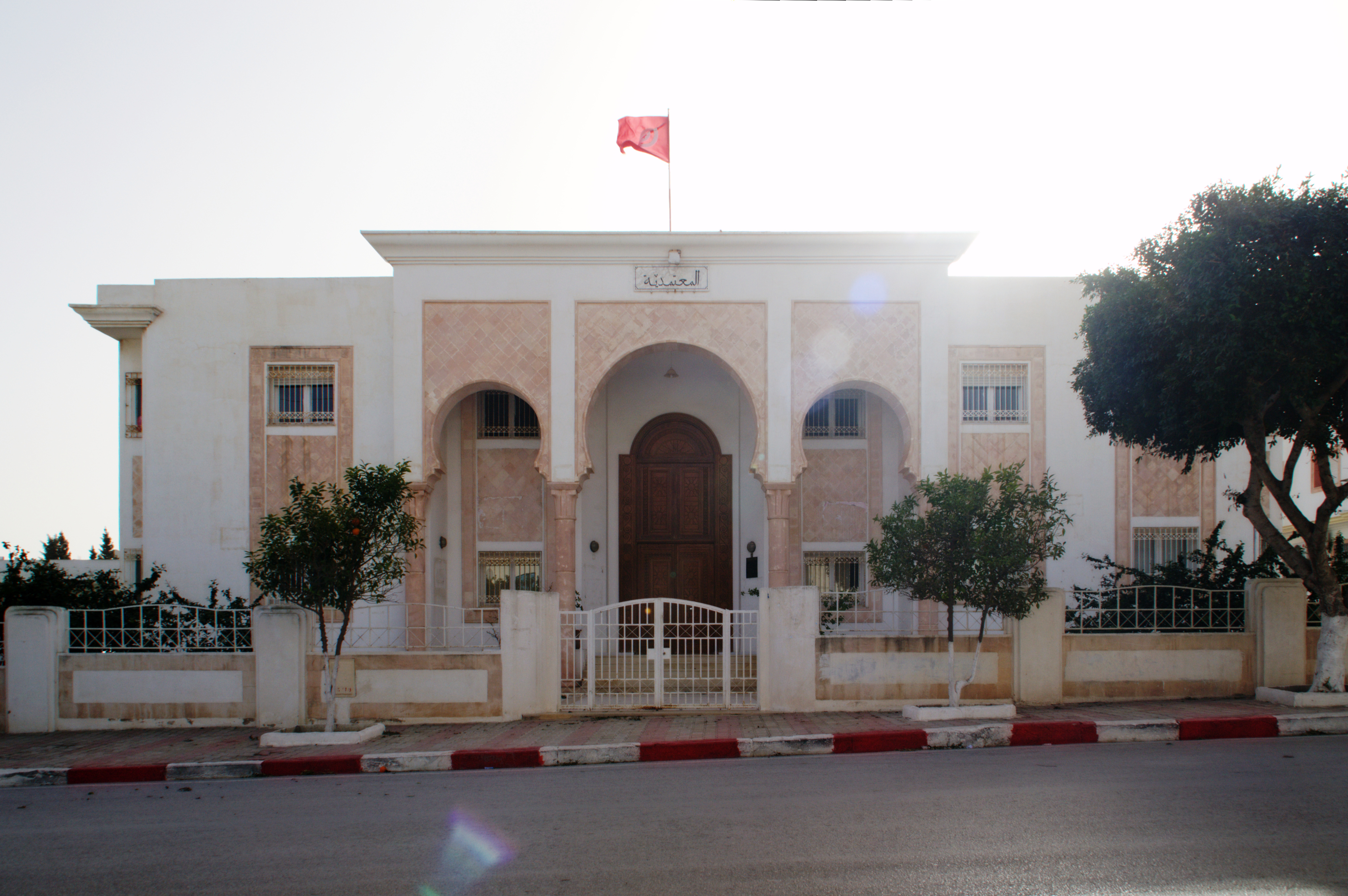 Siège de la délégation de Sayada, Lamta et Bouhajer.